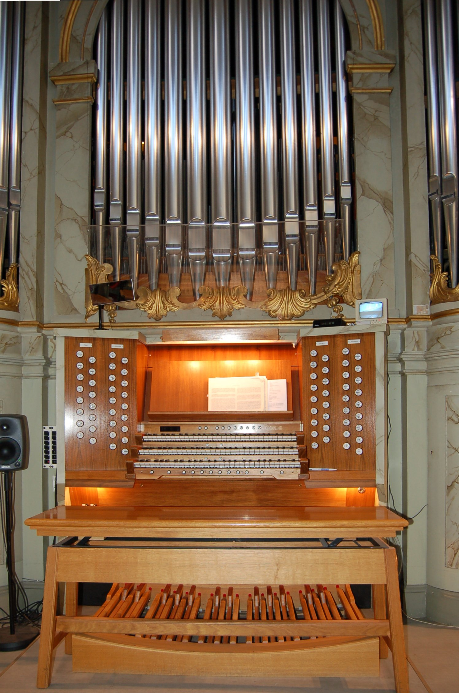 Klaviaturen till orgeln i Hedvig Eleonora kyrka i Stockholm.